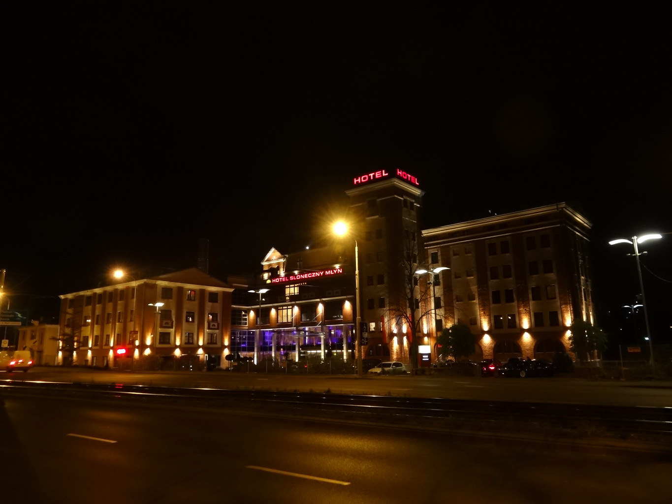 Hotel Słoneczny Młyn w Bydgoszczy przy ul. Jagiellońskiej